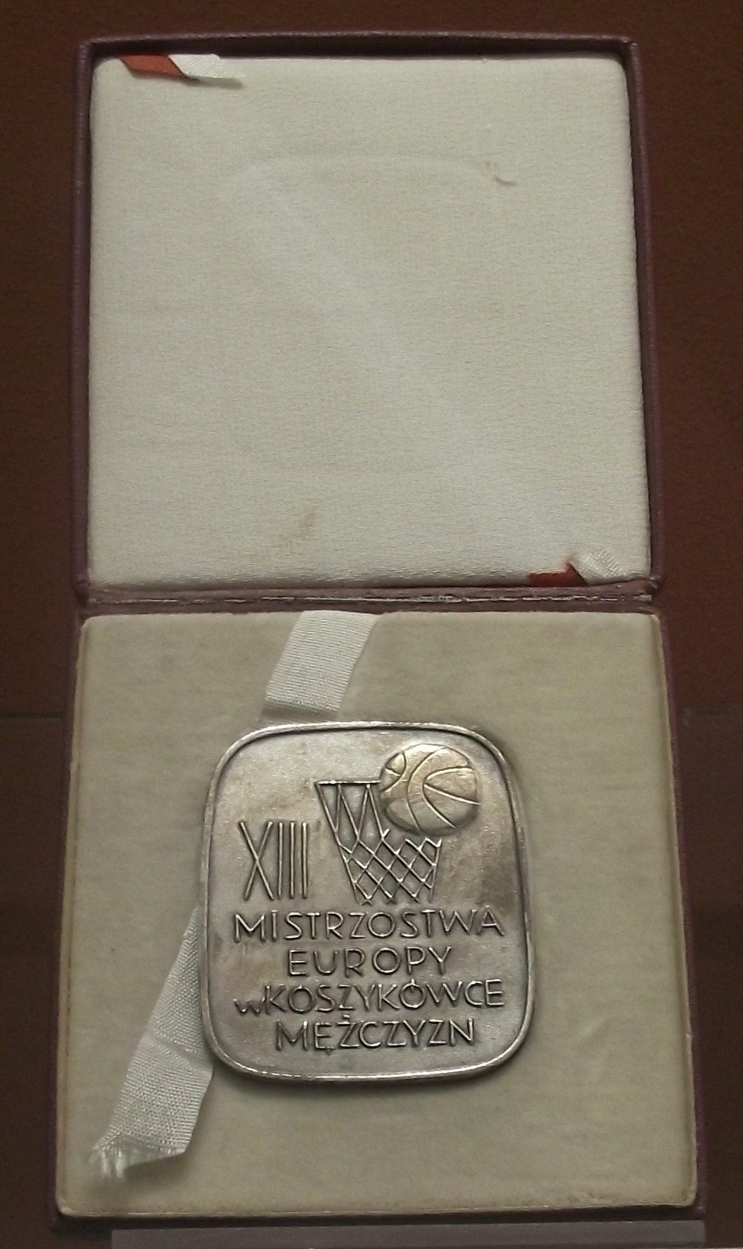 Srebrny medal XIII Mistrzostw Europy w Koszykówce Mężczyzn, rozegranych w 1963 roku we Wrocławiu będący własnością kapitana reprezentacji Polski podczas tych mistrzostw - Mieczysława Łopatki.